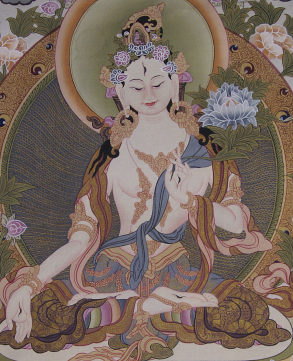 Immagine da wiki en